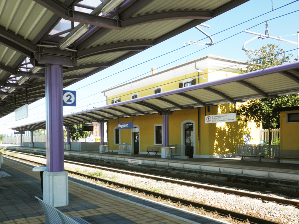 Stazione ferroviaria di Gaggiano